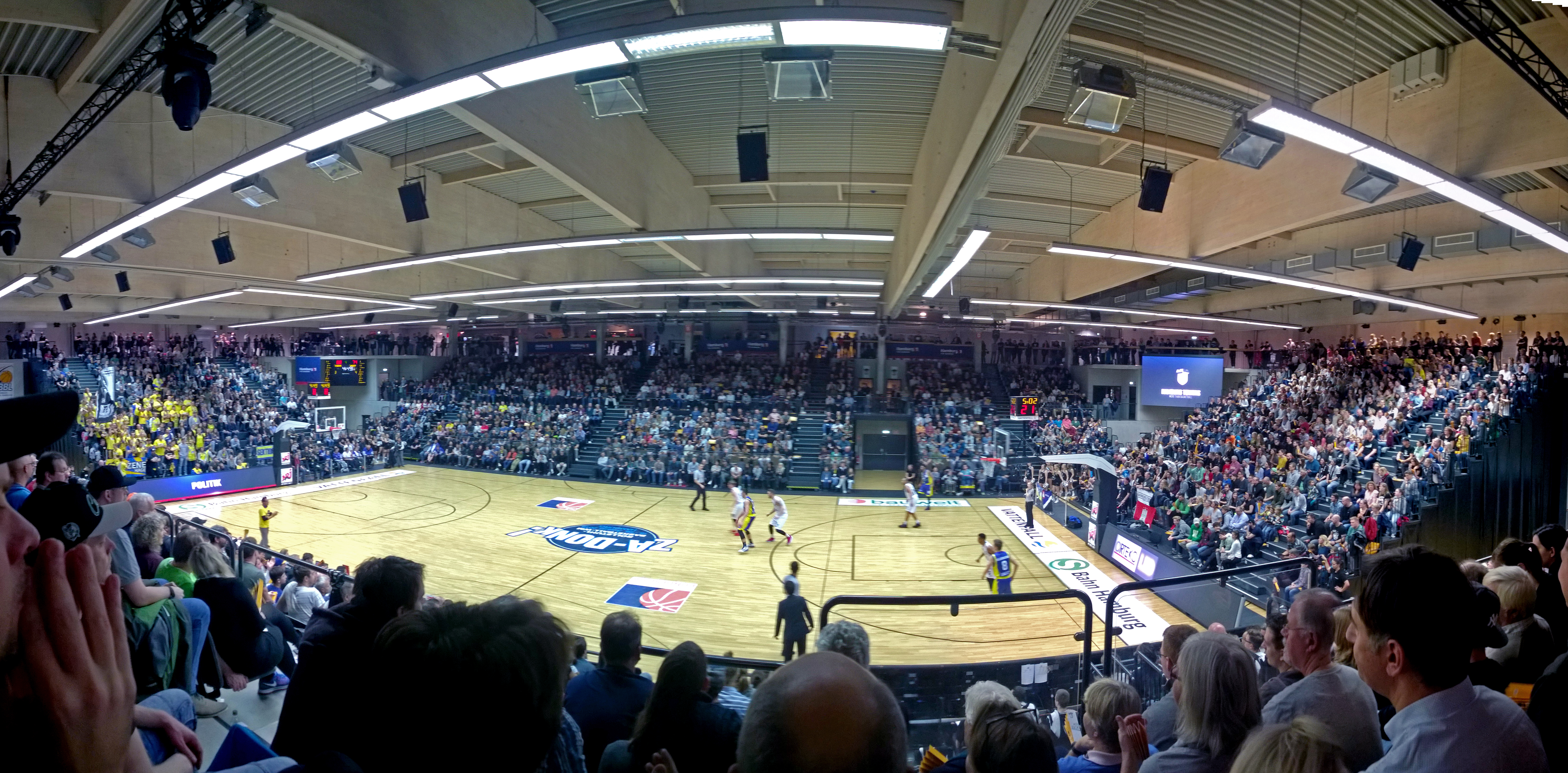 Edel-optics.de Arena während eines Spiels der Towers Hamburg